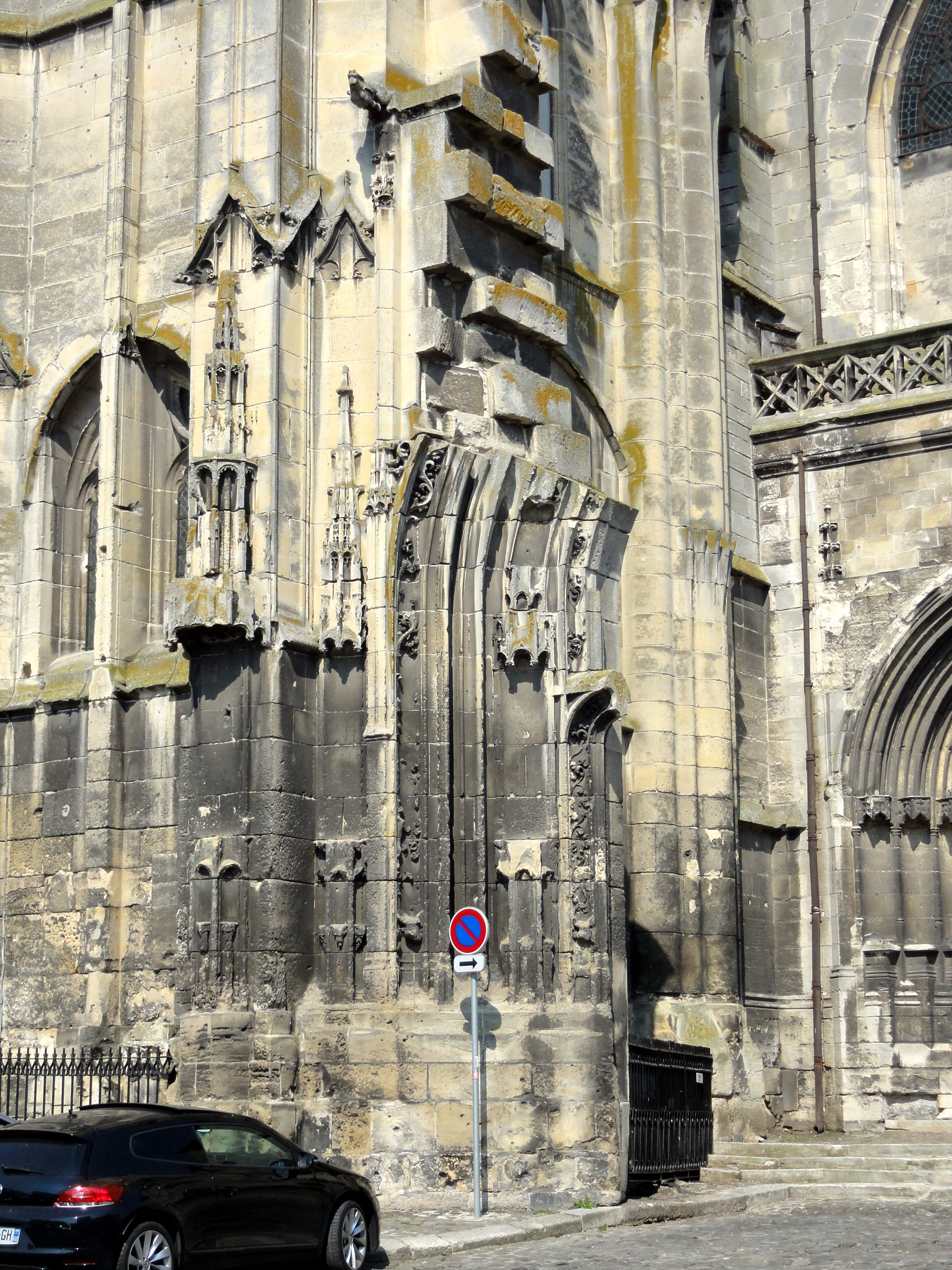 Portail occidental : début de construction d'un portail flamboyant au XVIe siècle.